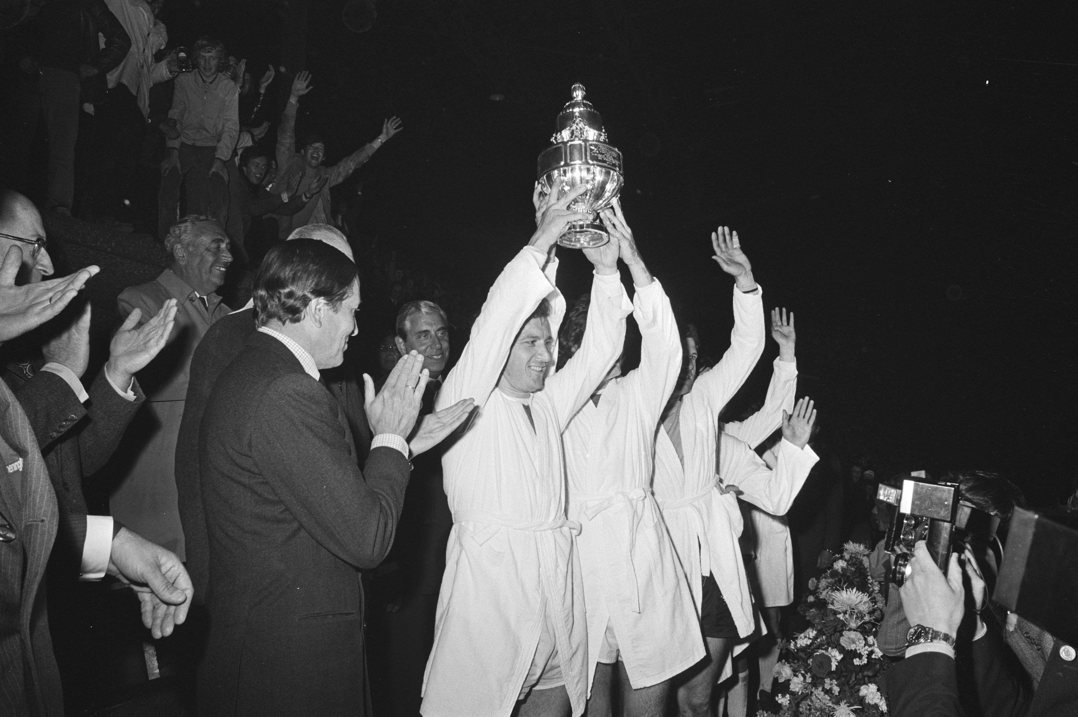 Collectie / Archief : Fotocollectie Anefo Reportage / Serie : Ajax tegen Sparta 2-1 bekerfinale Beschrijving : Prins Claus (l) en Ajax-speler Vasovic met de beker Annotatie : Randnummers negatiefstrook: 5: Prins Claus (l) en Vasovic met beker; 6: vlnr Vasovic, Hulshoff en Stuy met beker Datum : 19 mei 1971 Locatie : Amsterdam, Noord-Holland Trefwoorden : prinsen, sport, voetbal, voetballers Persoonsnaam : Claus (prins Nederland), Vasovic, Velibor Fotograaf : Fotograaf Onbekend / Anefo Auteursrechthebbende : Nationaal Archief Materiaalsoort : Negatief (zwart/wit) Nummer archiefinventaris : bekijk toegang 2.24.01.05 Bestanddeelnummer : 924-5679